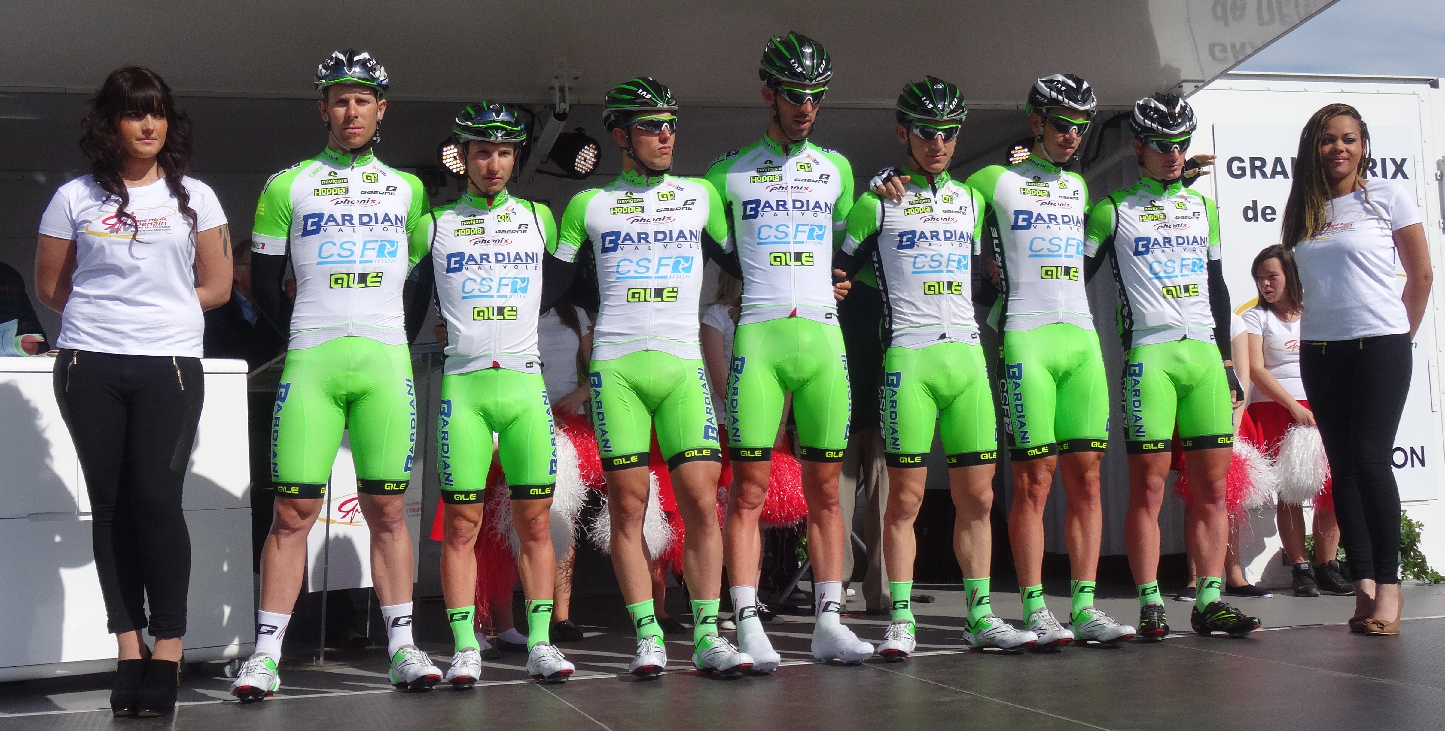 Reportage réalisé le jeudi 17 avril à l'occasion du départ et de l'arrivée du Grand Prix de Denain 2014 à Denain, Nord, Nord-Pas-de-Calais, France.